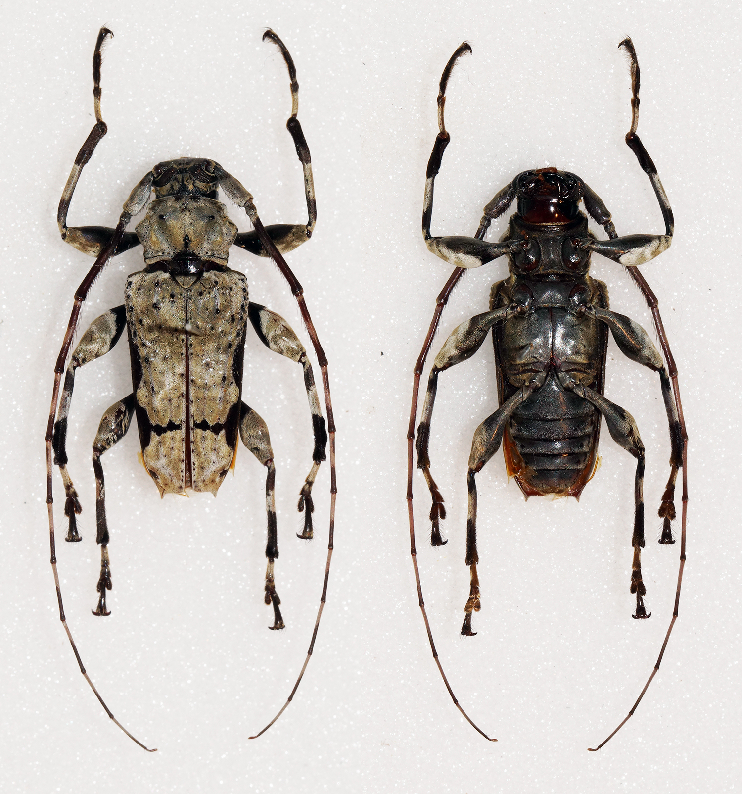 Linnaeus,1758 Sex: Male Data: 04-2012 - Atalaya - Ucayakli - Raymondi District - Peru Size: 19mm